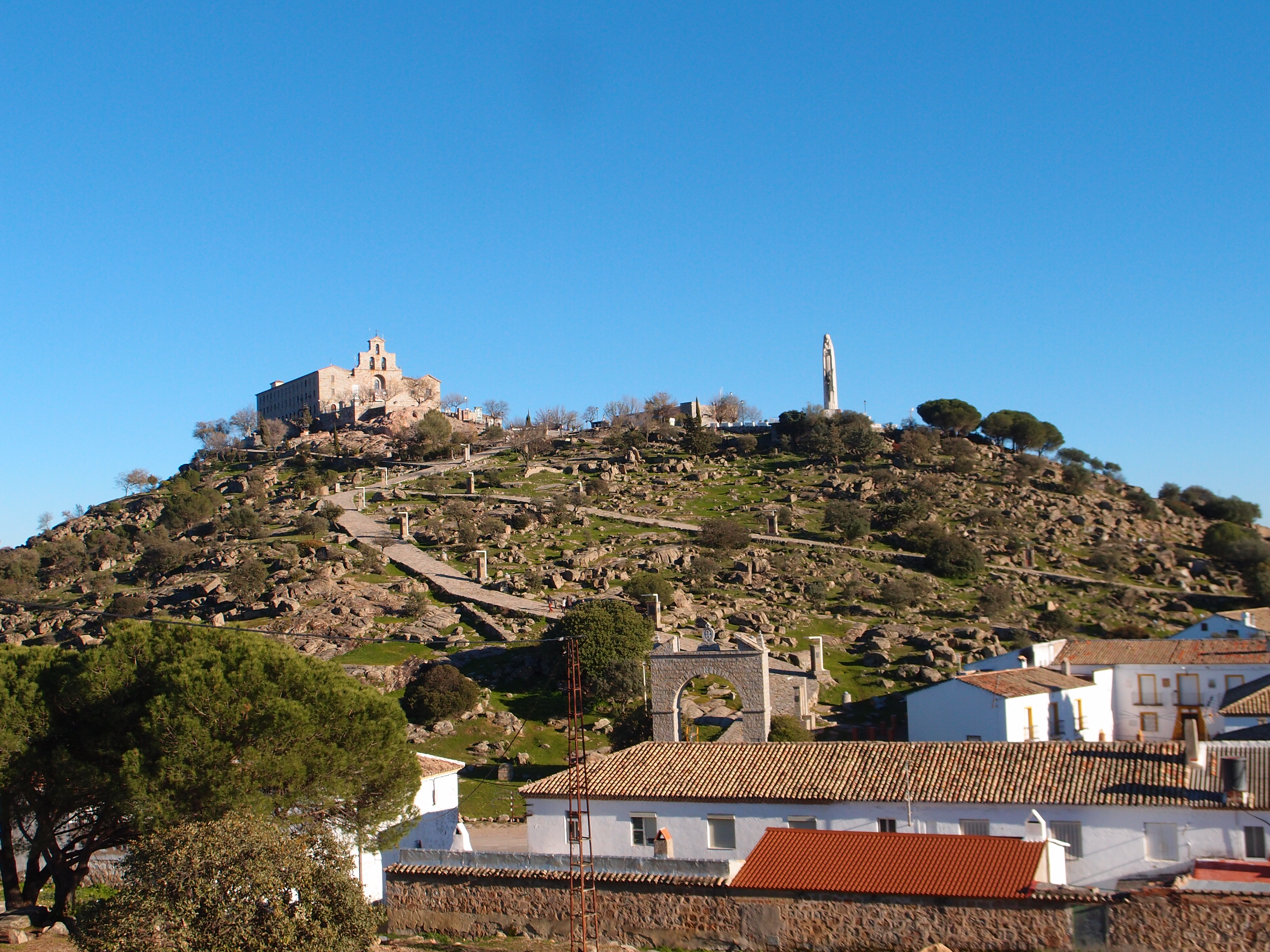 Vista general de la Basílica y Real Santuario de Nuestra Señora de la Cabeza.